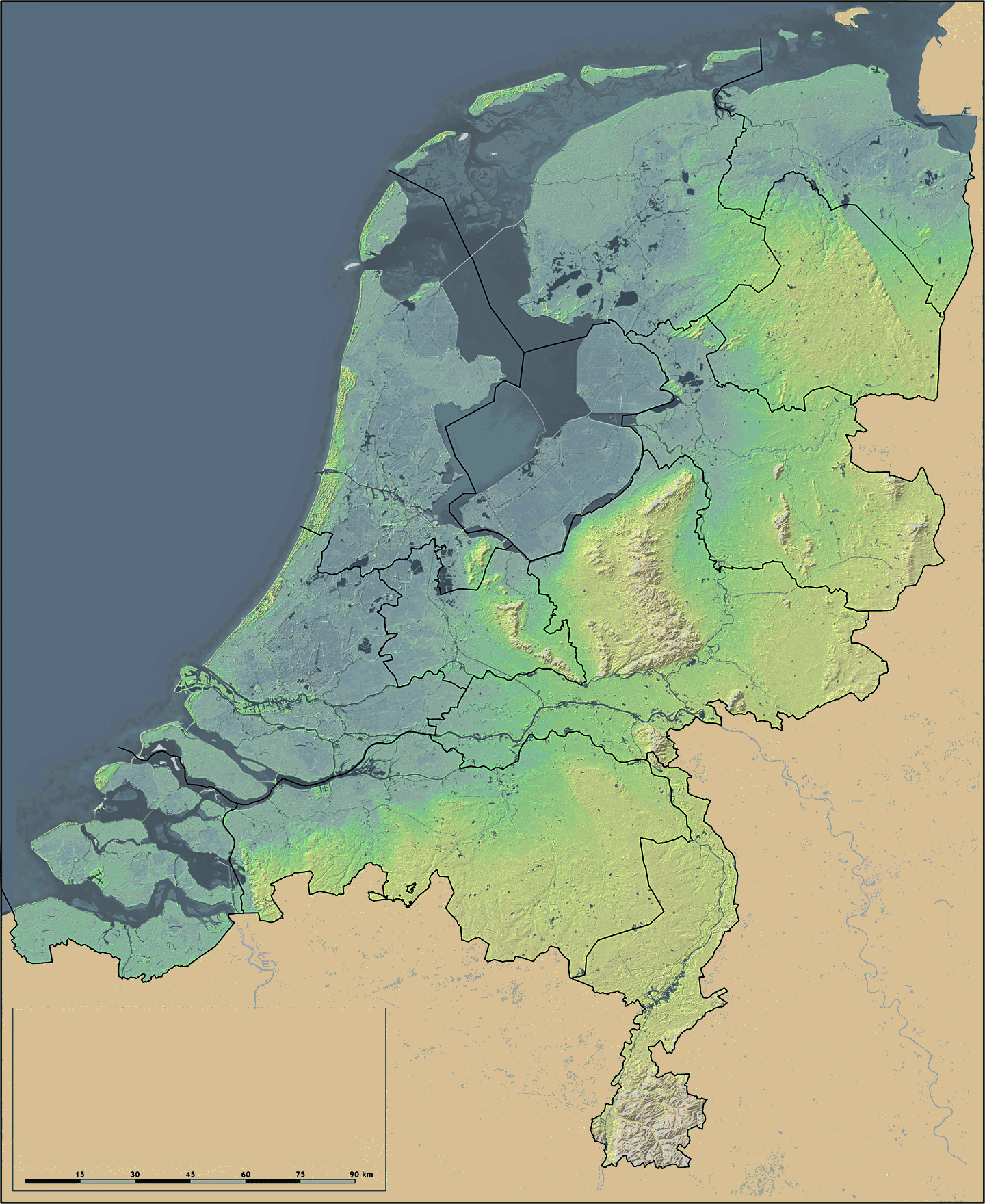 Reliëfkaart van Nederland, 1440 pix